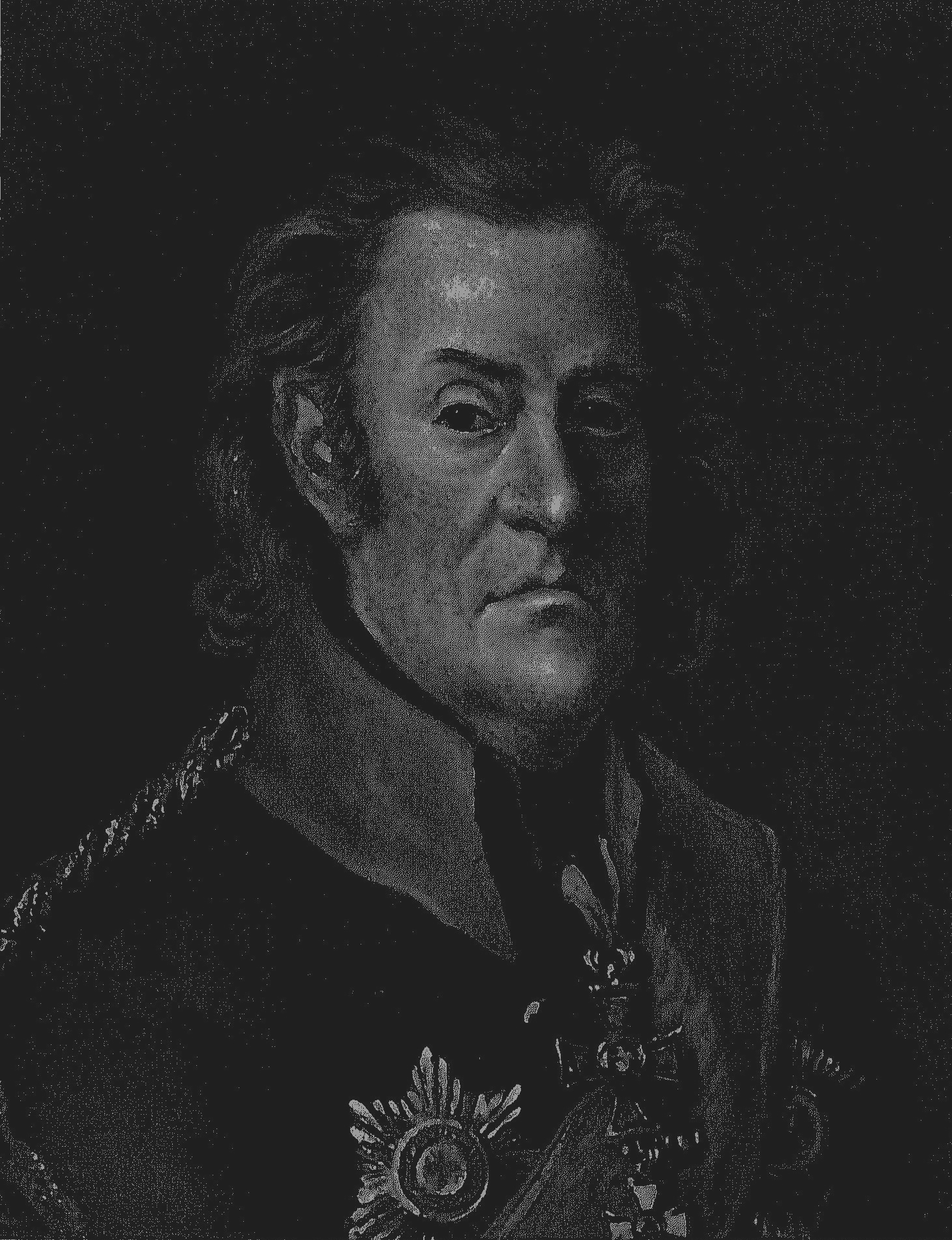 Петр Петрович Долгоруков (1744-1815)